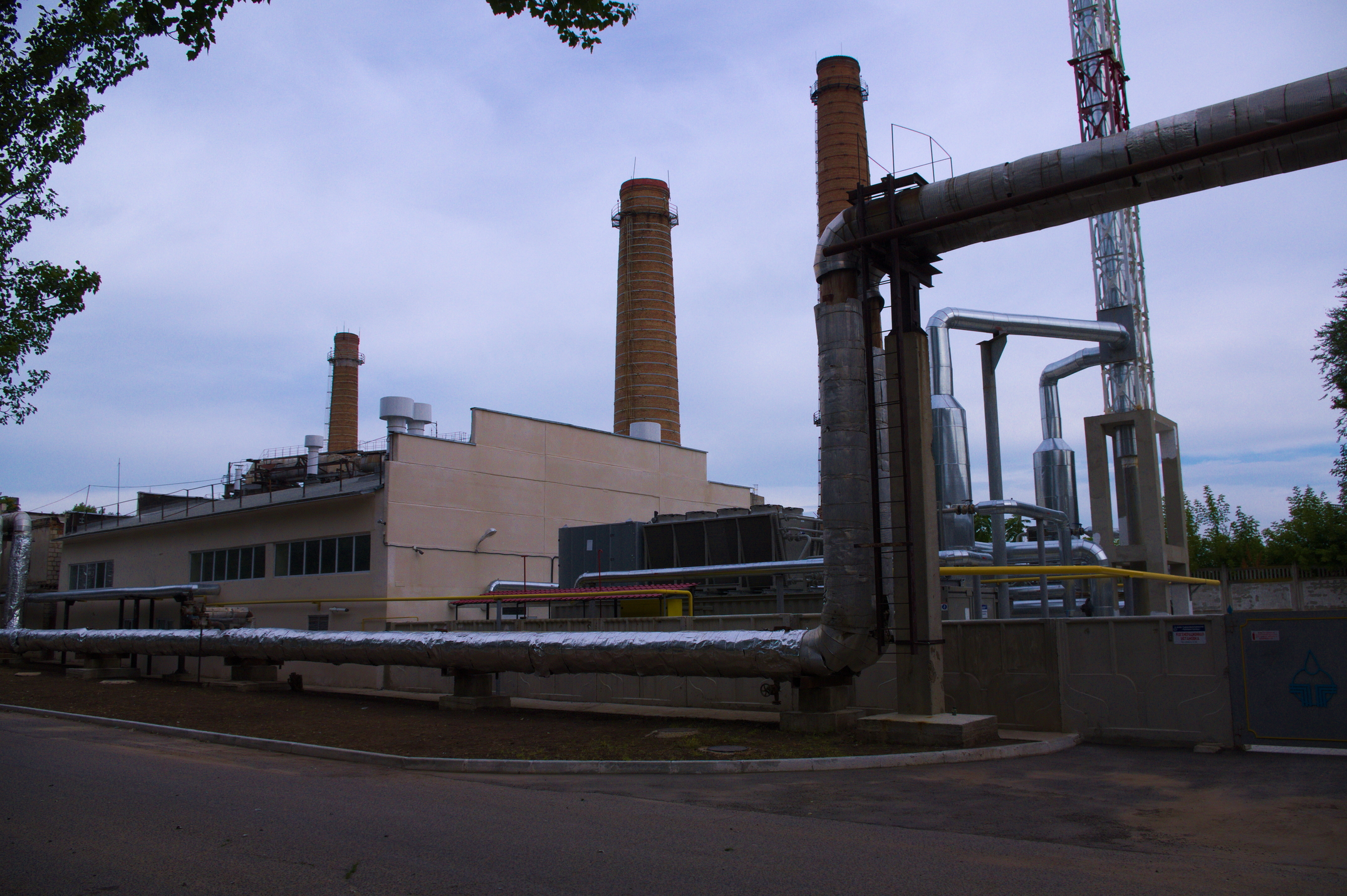 Когенерационная электростанция мощностью около 3 МВт в Тирасполе. Вид топлива: природный газ. Собственник: ООО "ТираспольТрансгаз". Телефон: 0 (533) 6-17-35